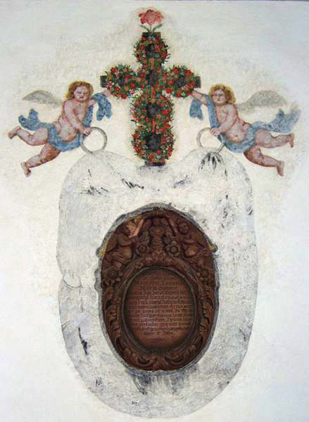 Sankt-Agathen-Kirche in Fahrnau, Holztafel mit Inschrift.